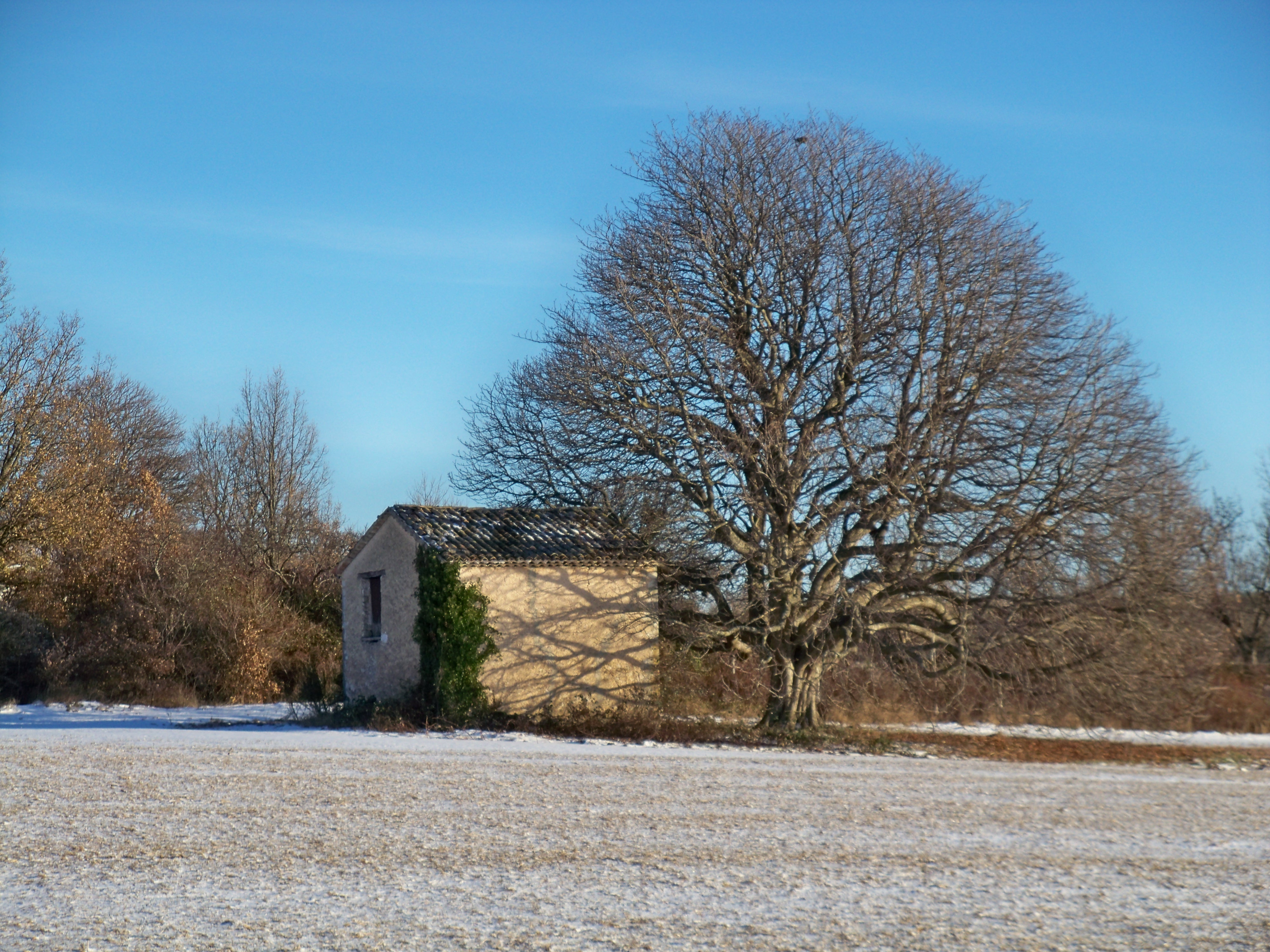 Cabanon à Revest du Bion (04)